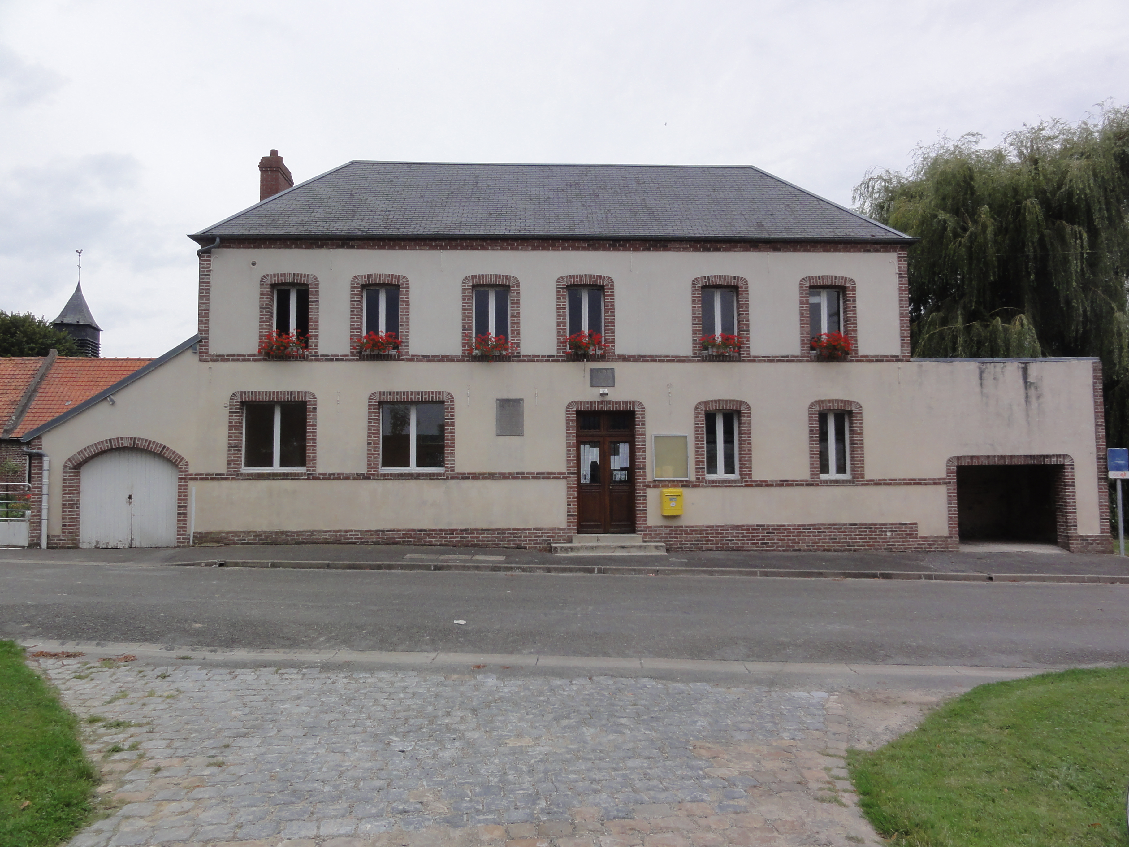 Fontaine-Uterte (Aisne) mairie et école